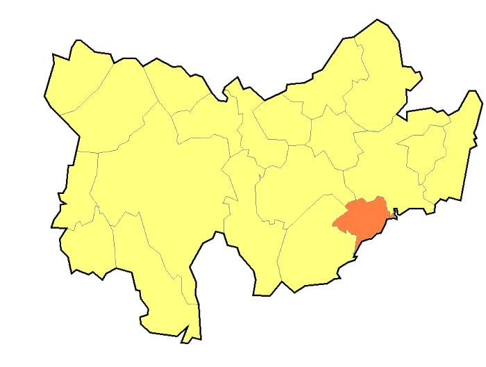 Hranice Nemotice (Vyškov-(Bučovice)- czech republic)